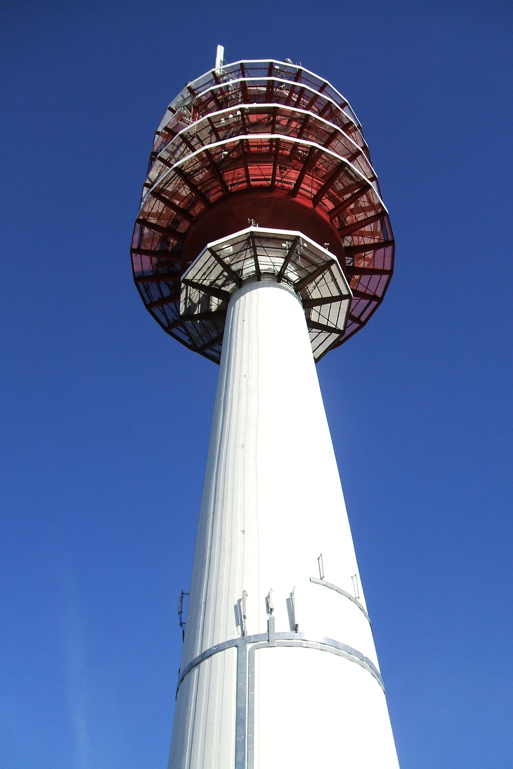 Tour TDF de Chennevières-sur-Marne, Val-de-Marne (94). auteur: Jc Rios